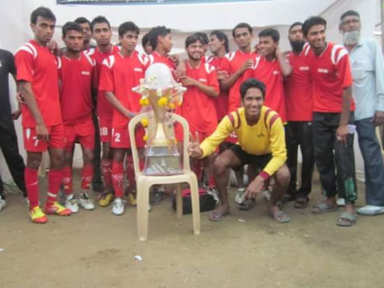 ینگ اقبال کلب